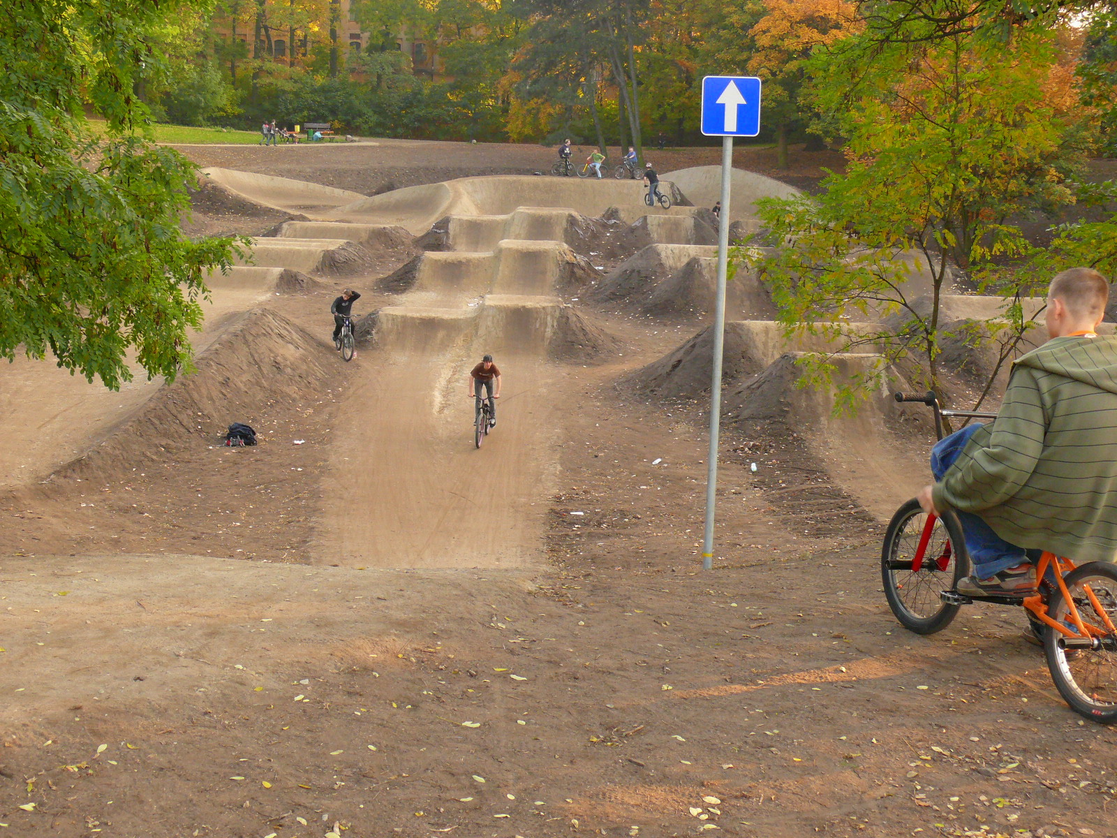 dirtpark i tor racing w Parku im. J.Poniatowskiego w Łodzi